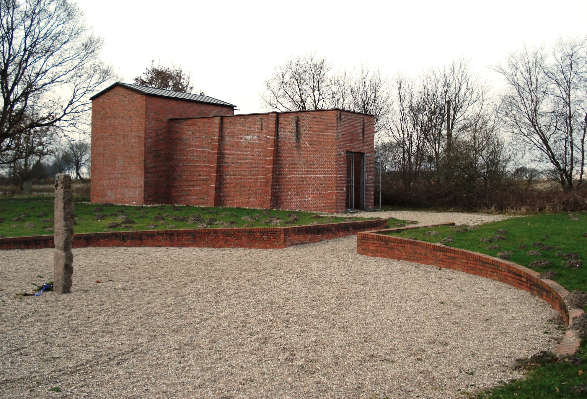 KZ-Husum-Schwesing - Gedenkstätte - Gebäude